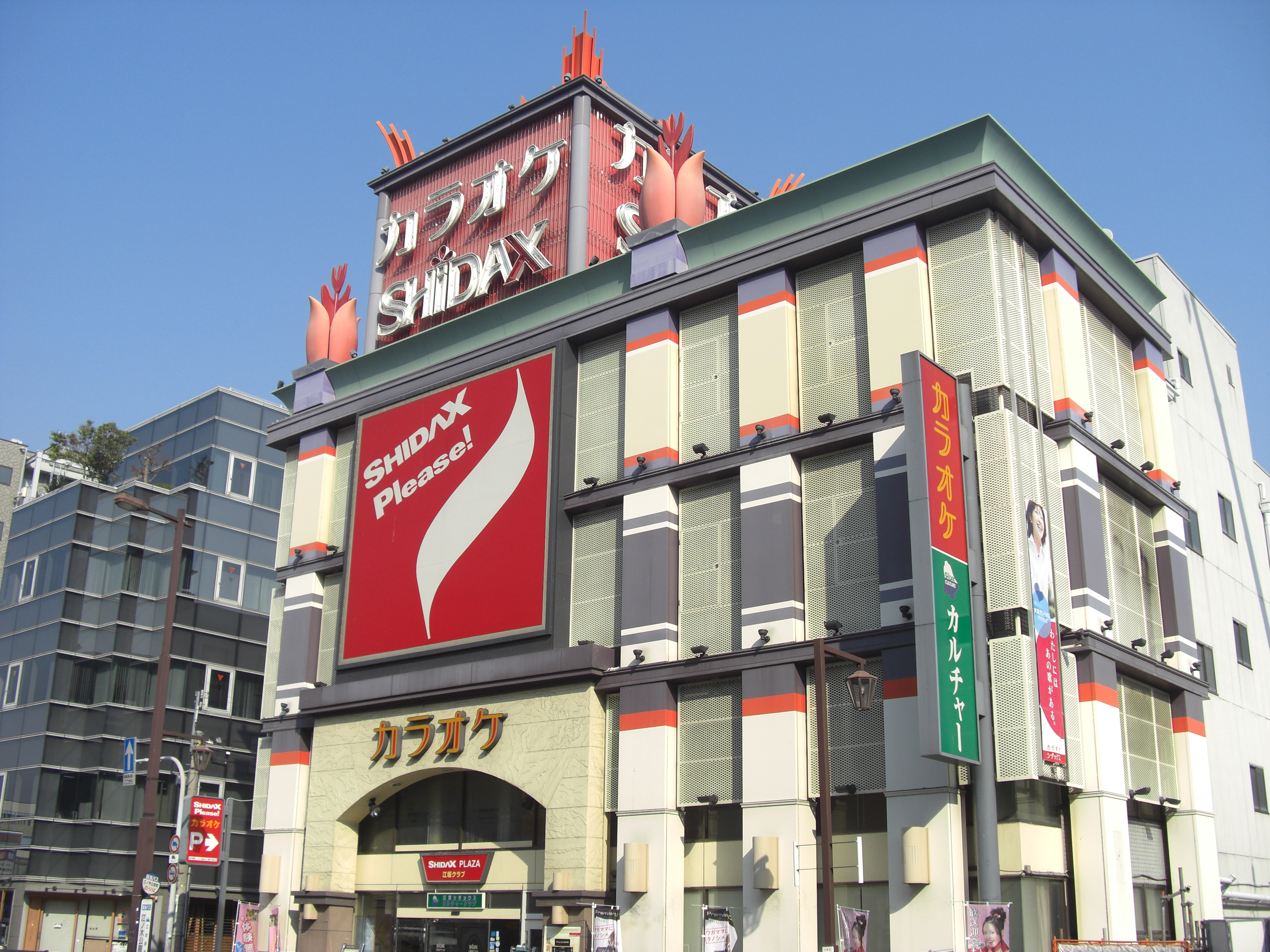 SHIDAX Esaka Plaza,Toyotsucho Suita-City Osaka Japan.